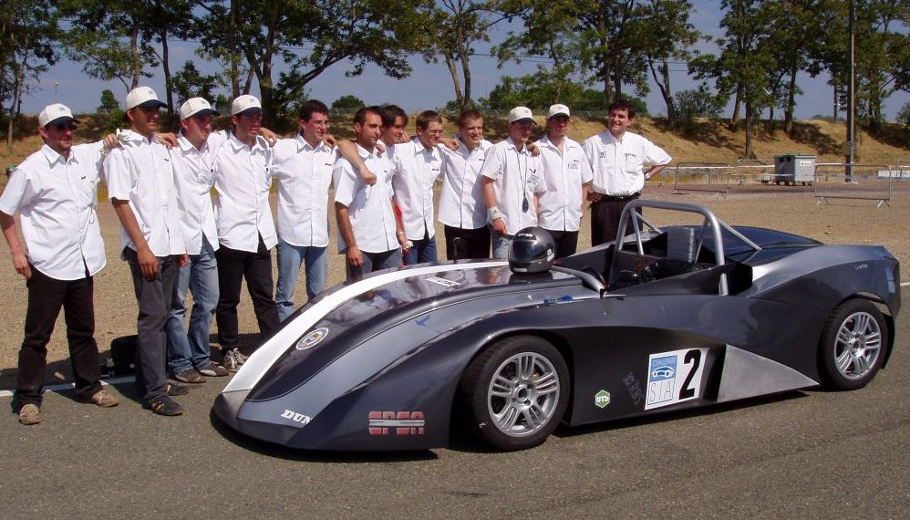 Véhicule Ecologique de Compétition centralien TTIM2006-Colzer